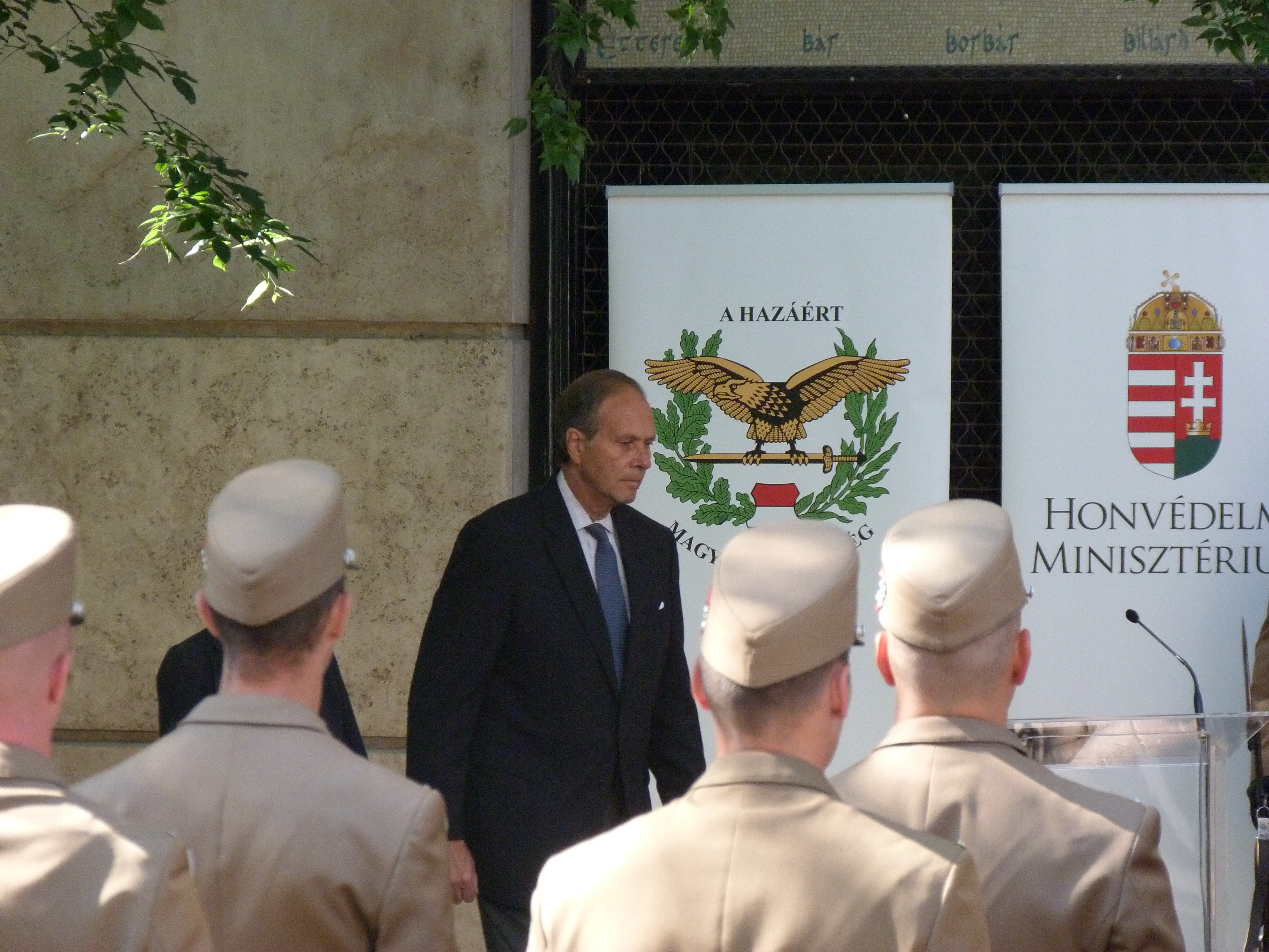 Koszorús Ferenc emléktáblájának koszorúzása.